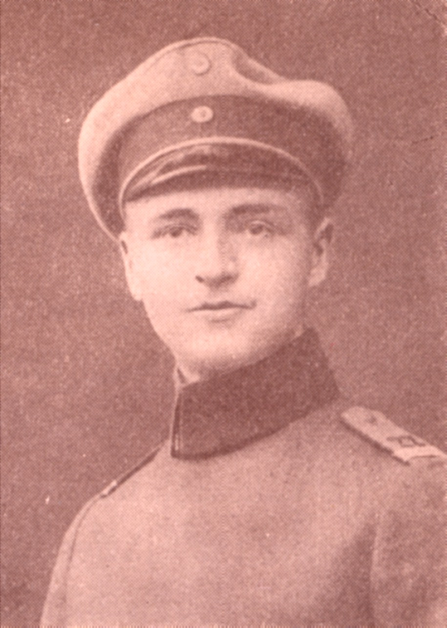 Description